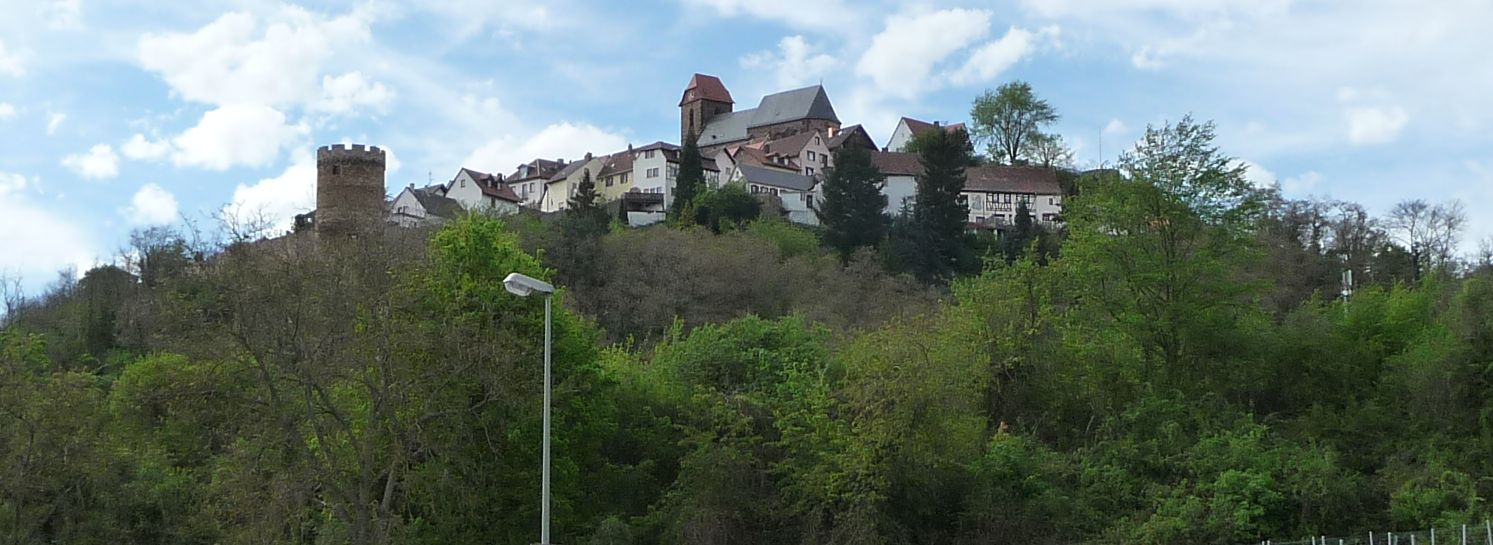 Neuleiningen